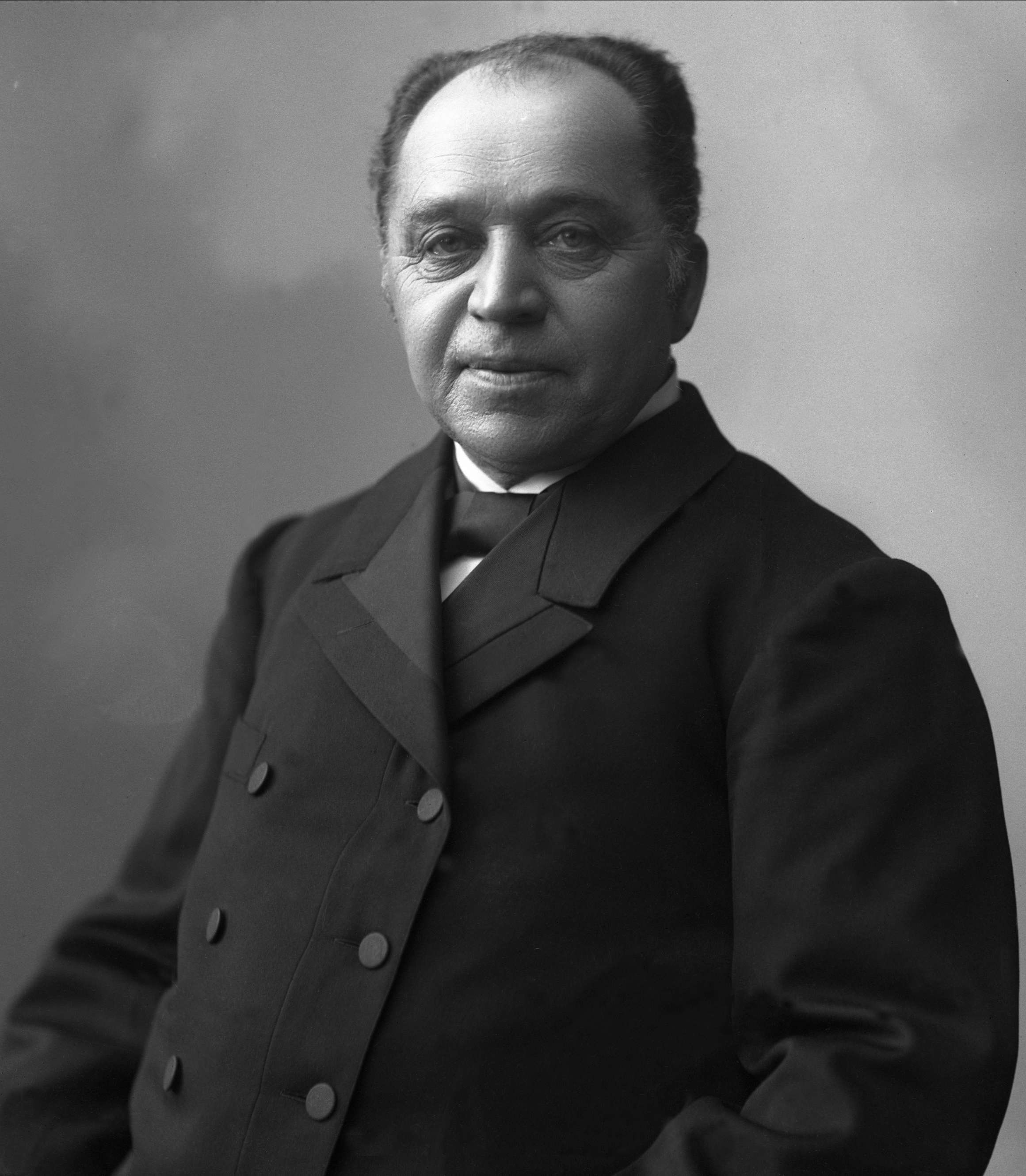 Johan Anton Lippestad (1844-1913) norsk skolemann, bror av Emma Hjorth.